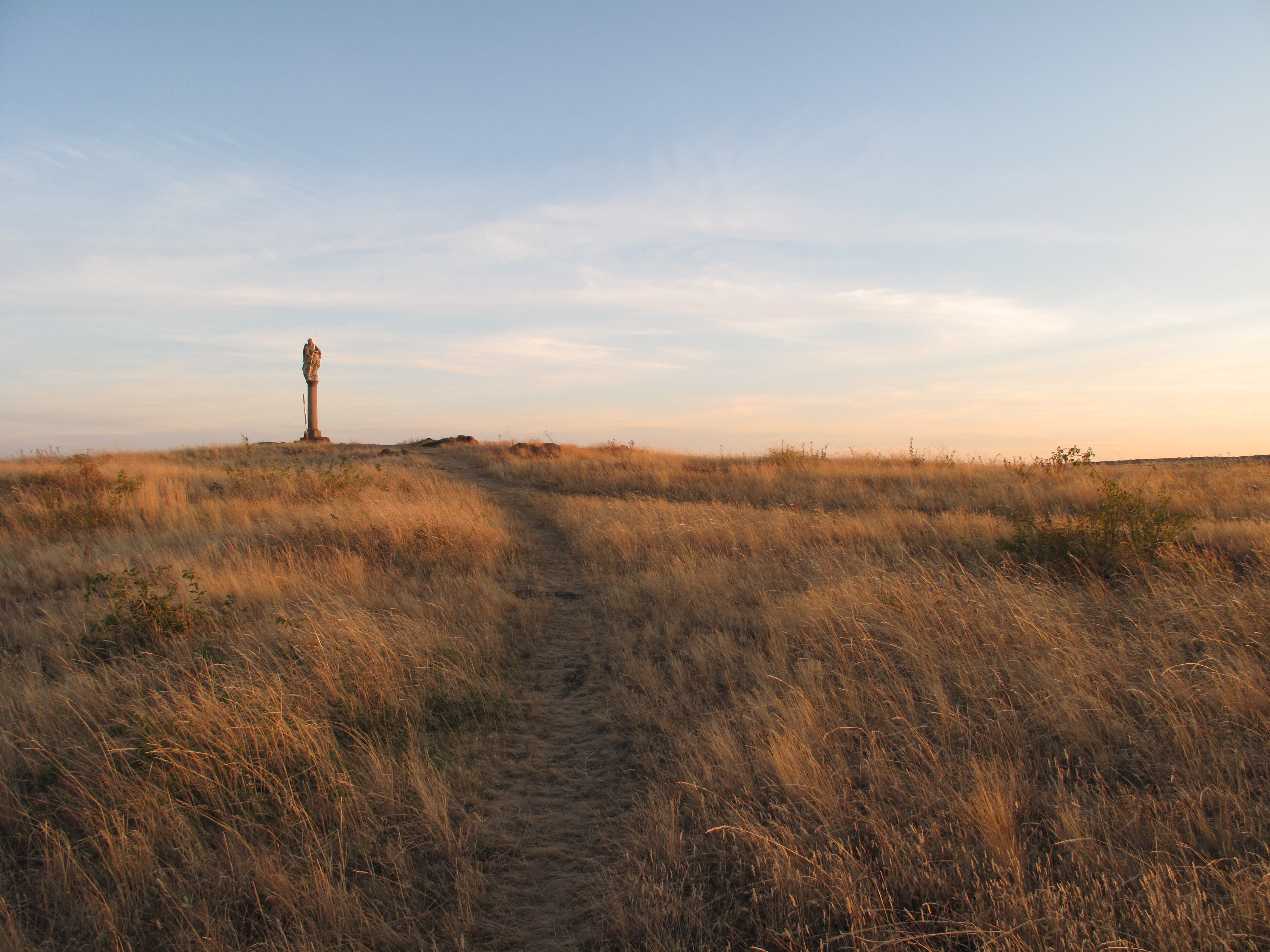 Přírodní památka U Michálka. Okres Znojmo, Česká republika.